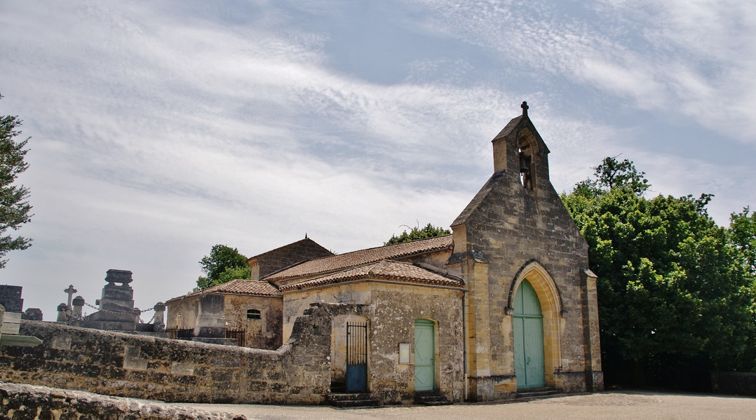 église St Laurent